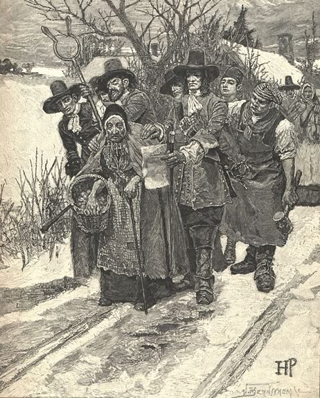 Description : scène générique montrant l'arrestation d'une femme pour sorcellerie, conventionnellement dessinée comme une mauvaise vieille femme par l'illustrateur Howard Pyle. L'image illustre un article de T. W. Higginson, The Second generation of Englishmen in America, qui évoque brièvement le procès des sorcières de Salem. Provenance : Source : Harpers New Monthly Magazine, Vol. 67, (June - November), 1883: 221. Une autre version (avec une légende en anlais intégrée à l'image) de cette même illusatration est disponible sur : .